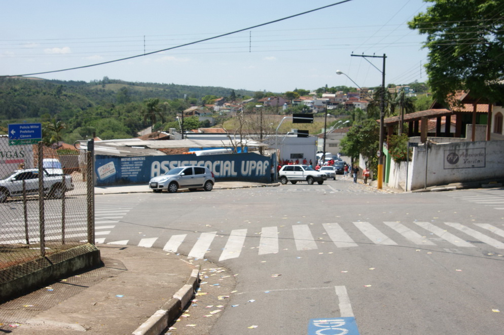 Imagem do município de Jarinu, estado de São Paulo, Brasil.